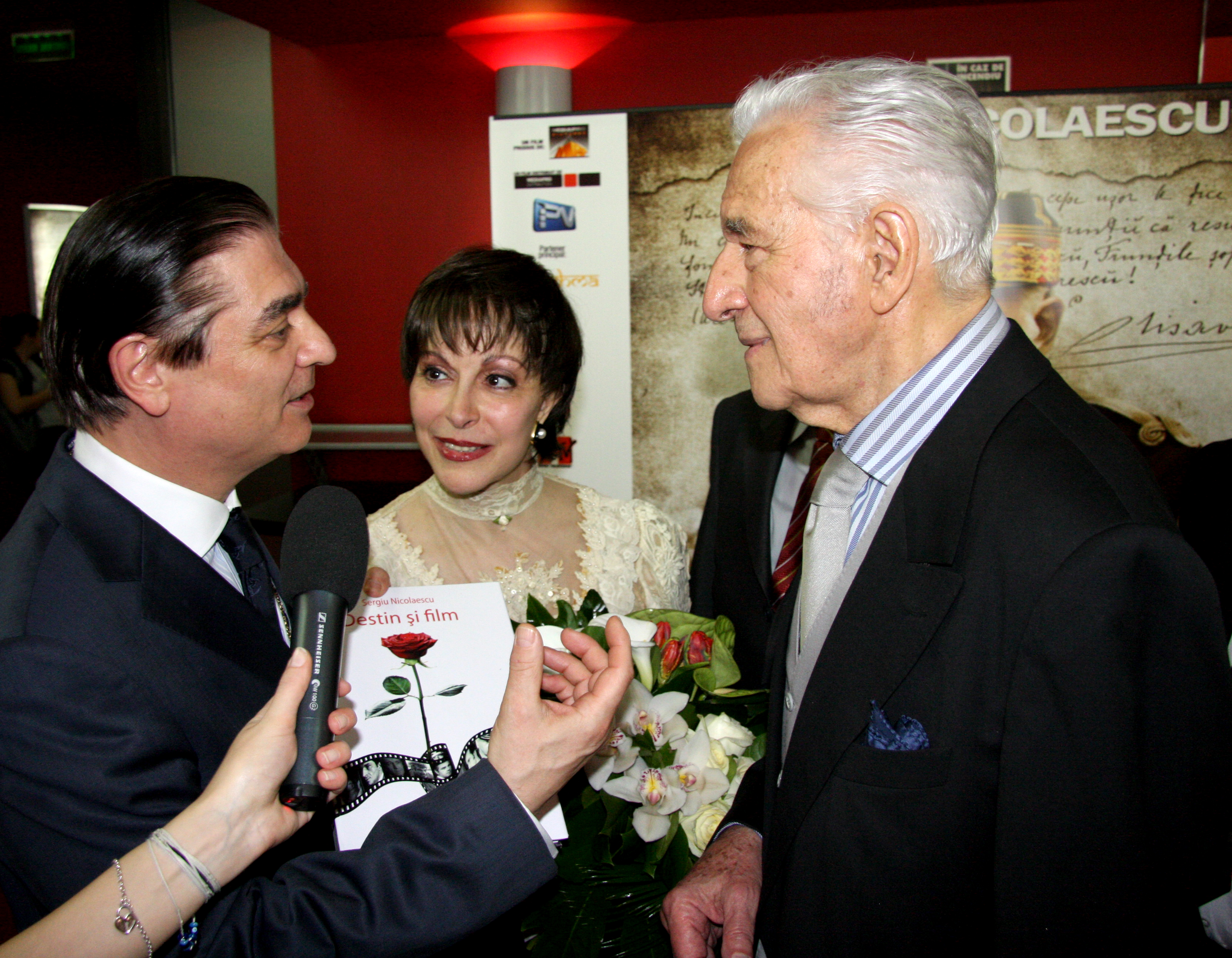 premiera Carol I